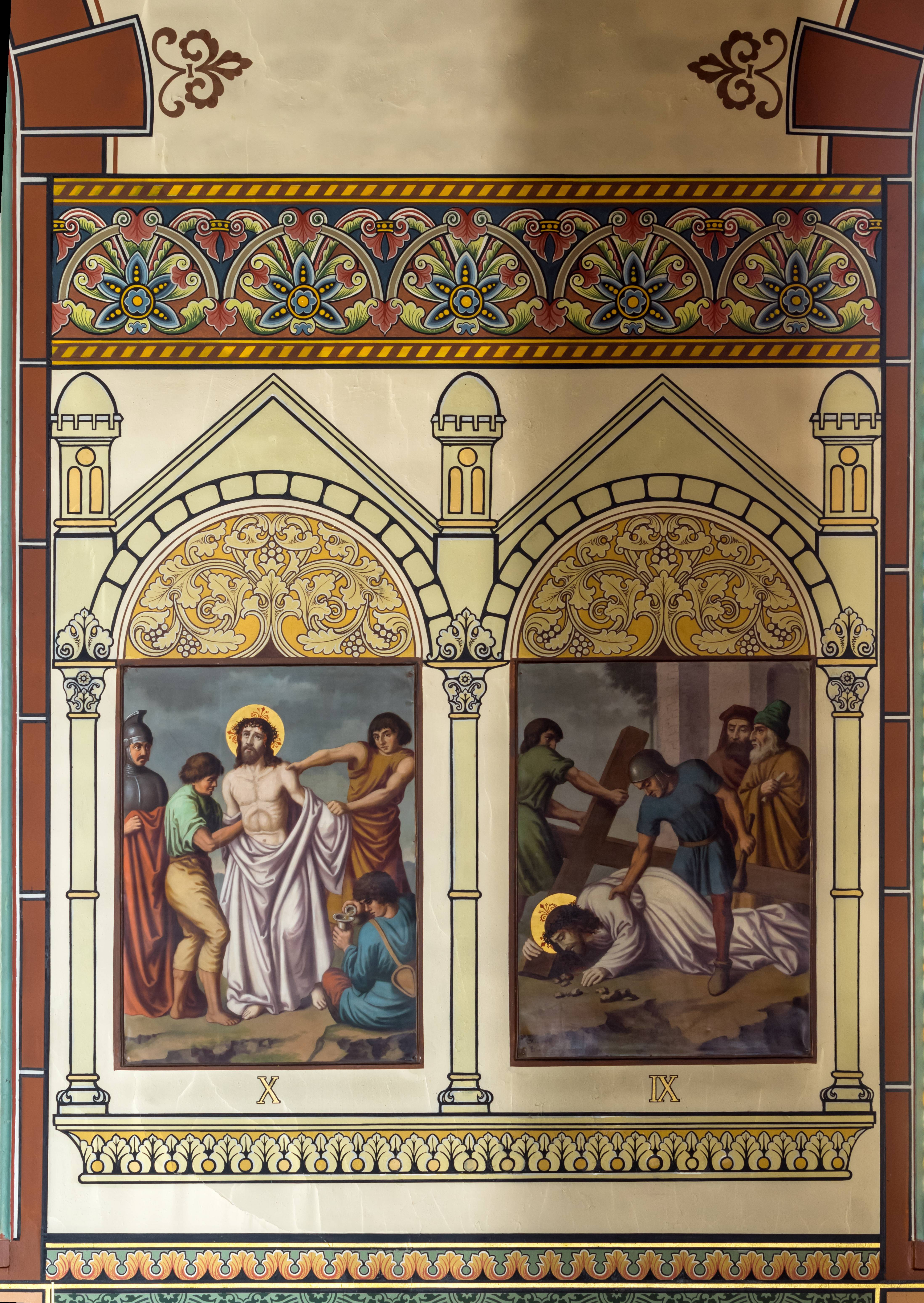 St. Peter und Paul in Bonndorf